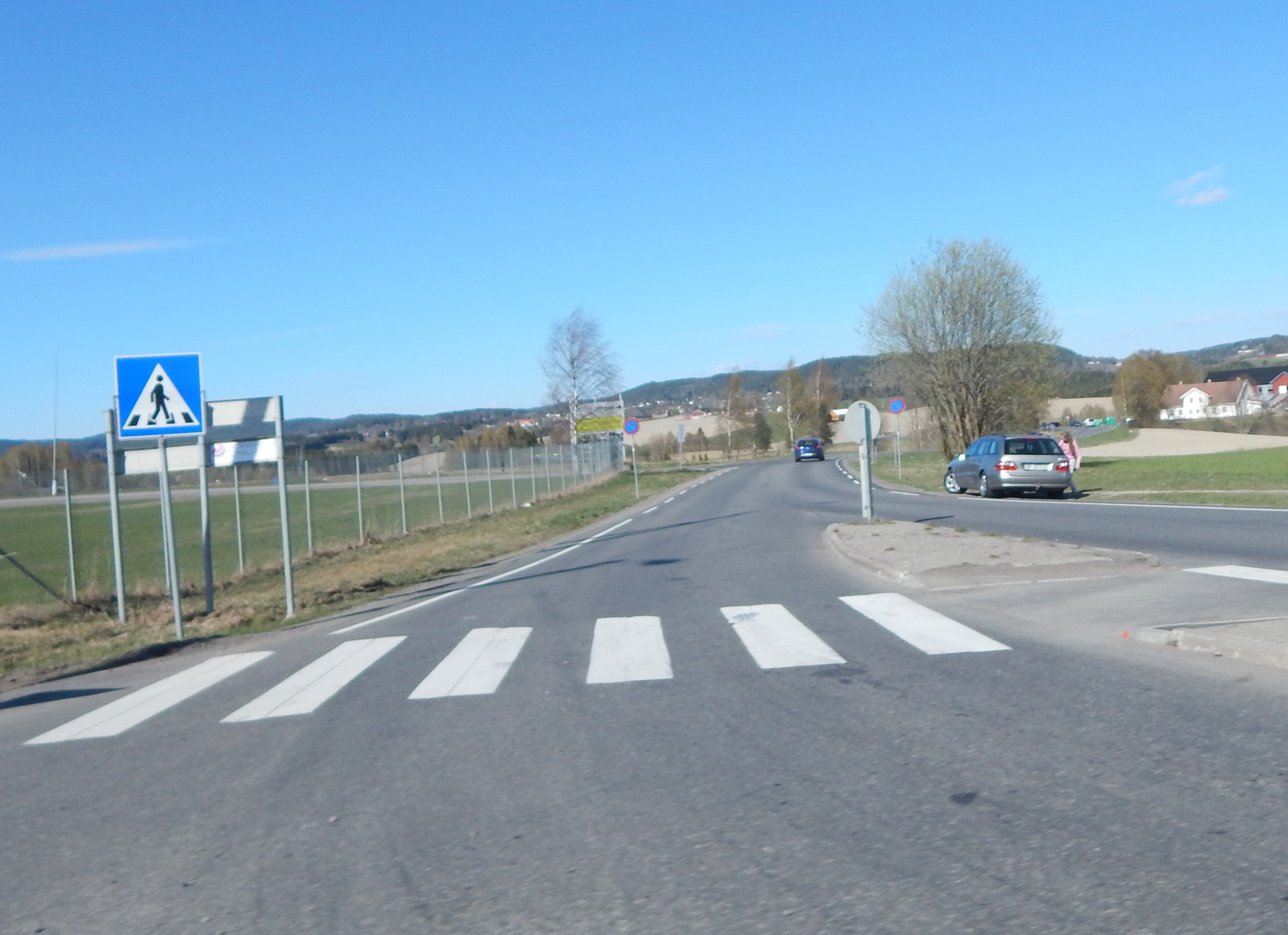 Fylkesvei 384 går nordover fra primær fylkesvei 22.